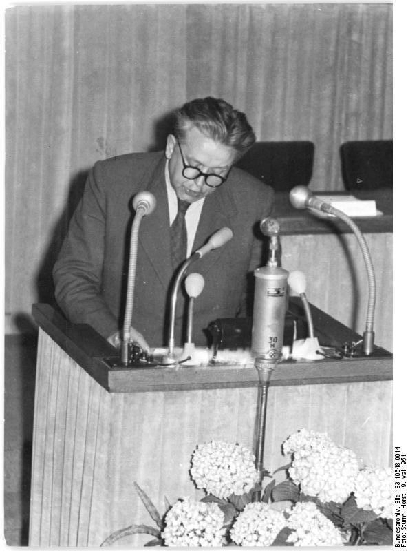 Illus-Sturm 9.5.1951- Volkskammer beschließt Volksbefragung. Am 9. Mai 1951, fand in Berlin eine Sitzung der Volkskammer statt, auf der der Stellvertretende Ministerpräsident Walter Ulbricht über die Volksbefragung in der DDR sprach. UBz: Diskussion zum Referat Walter Ulbricht (Hans Müller, SPD) bei seiner Diskussionsrede.